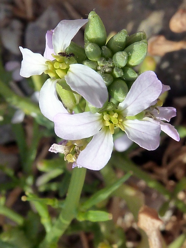 Cakile maritima (oruga de mar) : inflorescencia, detalle - Playa de Poniente, Dique de la Rambla del Cañarete, Águilas (Murcia, España).